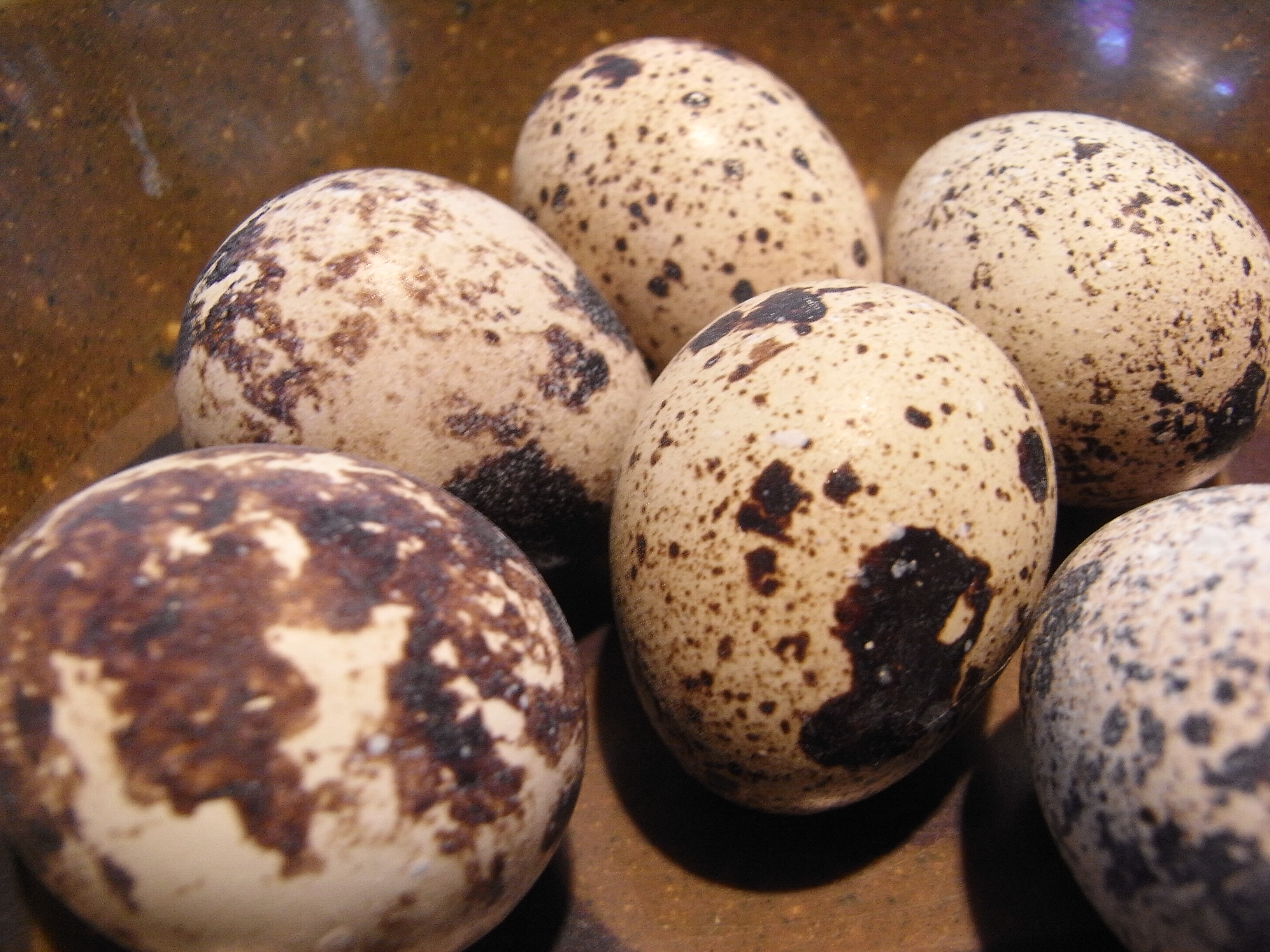 鶉卵（東京・新宿区河田町2-6、牛込柳町駅最寄りの「長寿庵 うどんそば」）。「月桂寺の隣にある長寿庵にて」